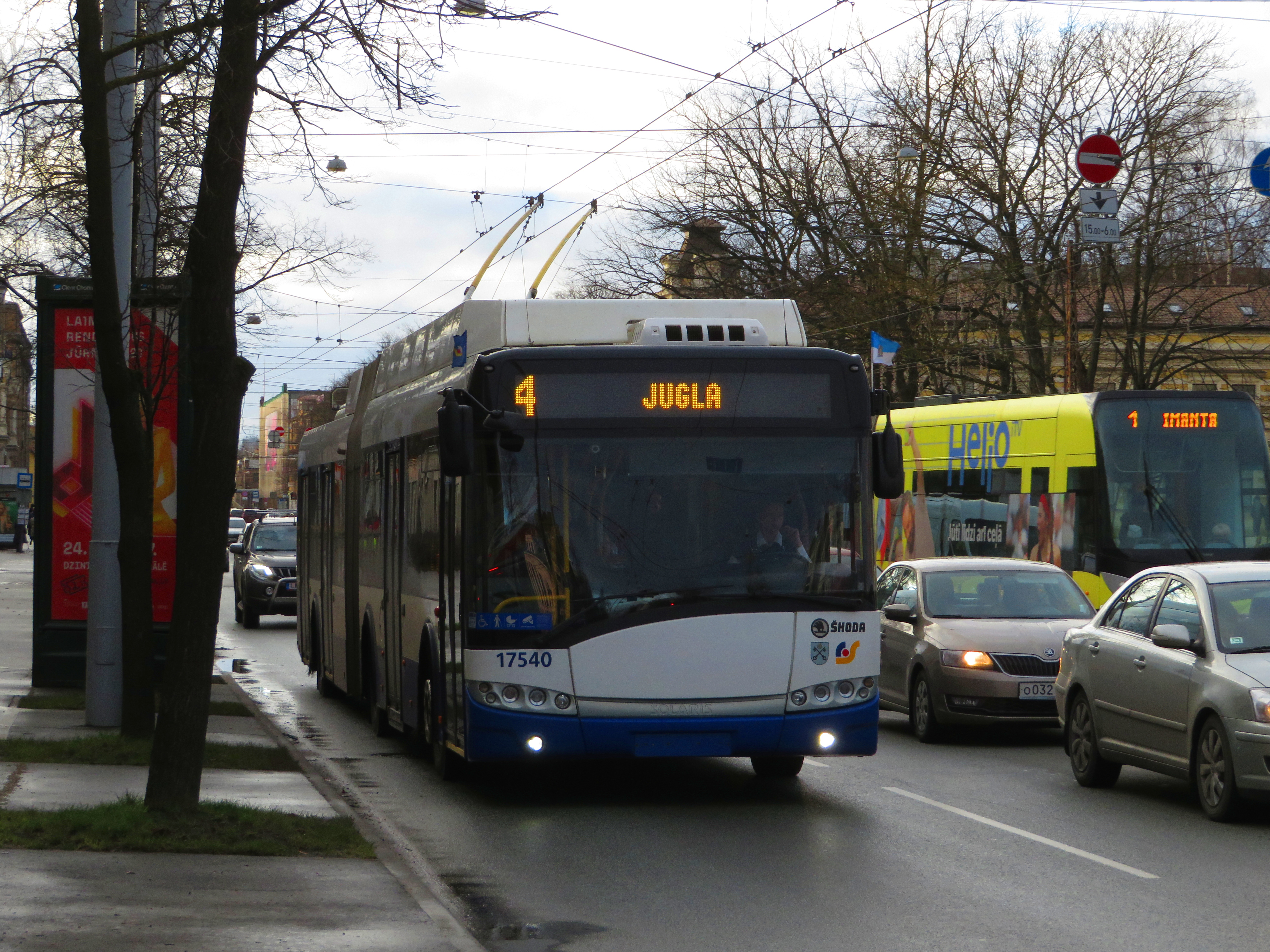 4. trolejbuss Brīvības ielā